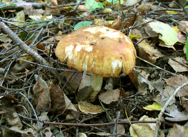 Russula foetens